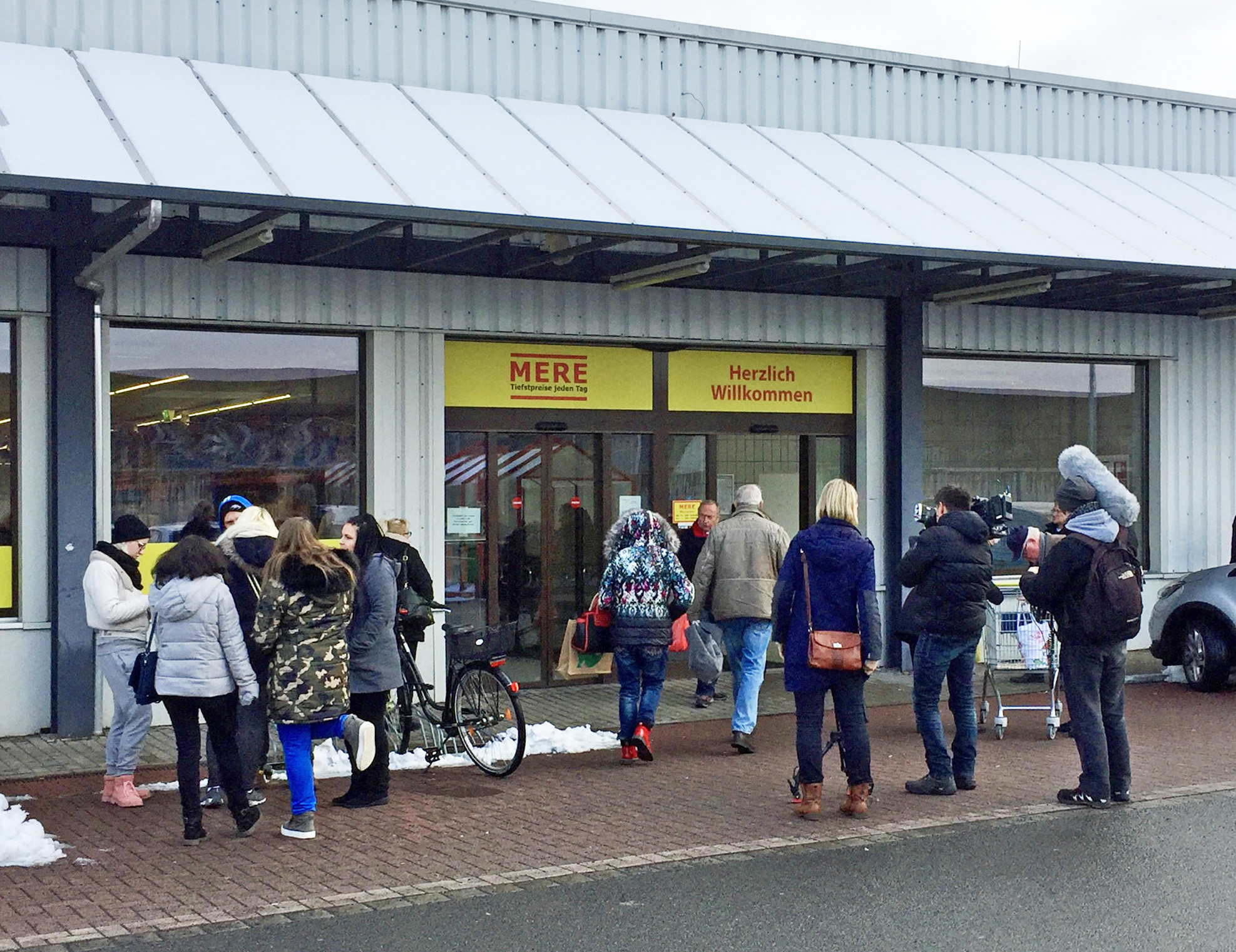 Mere-Supermarkt